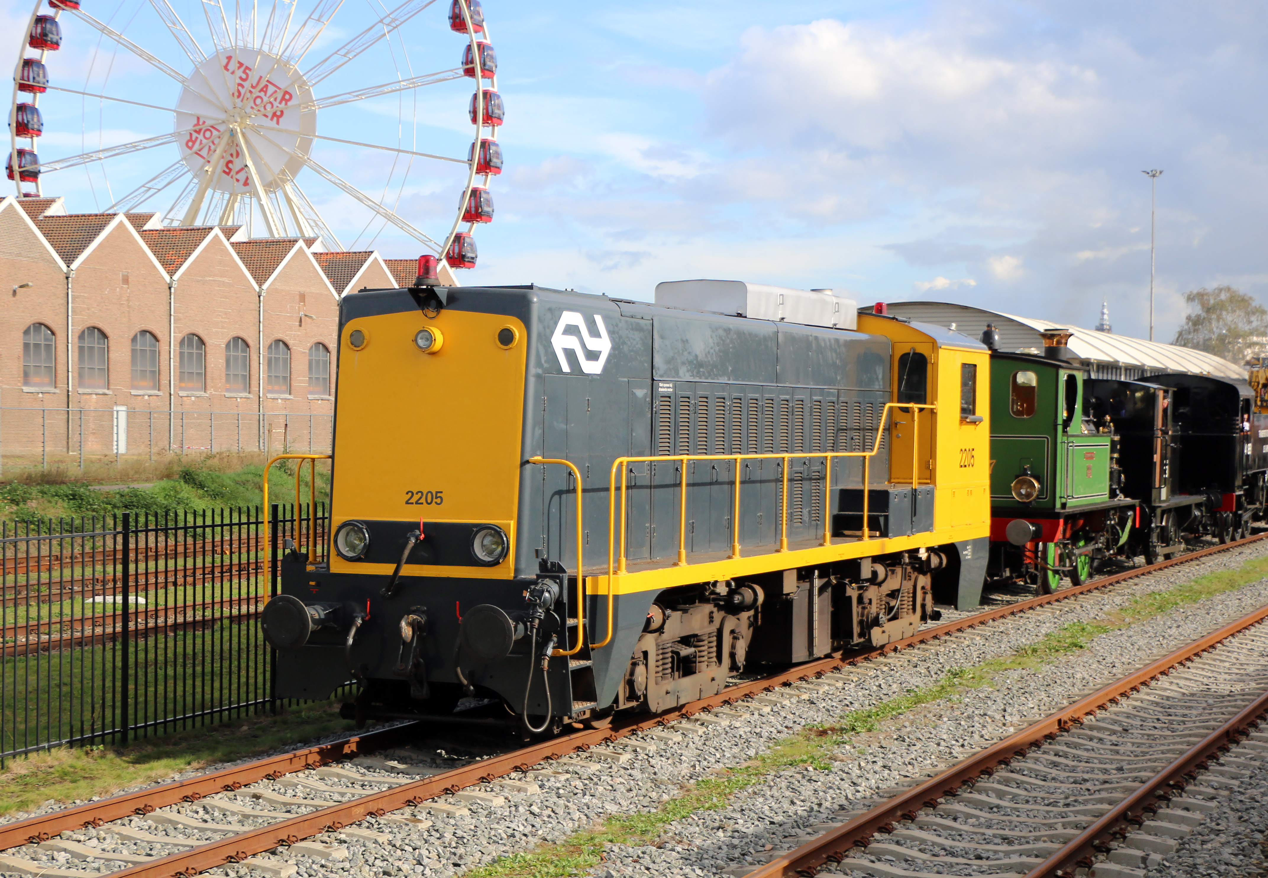 De 2205 van de Stichting Historisch Dieselmaterieel wordt weer in de rij opgesteld voor de volgende voorstelling tijdens de Spoorparade. 20 oktober 2014.